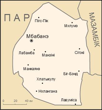 Беларуская (тарашкевіца): Мапа Эсваціні